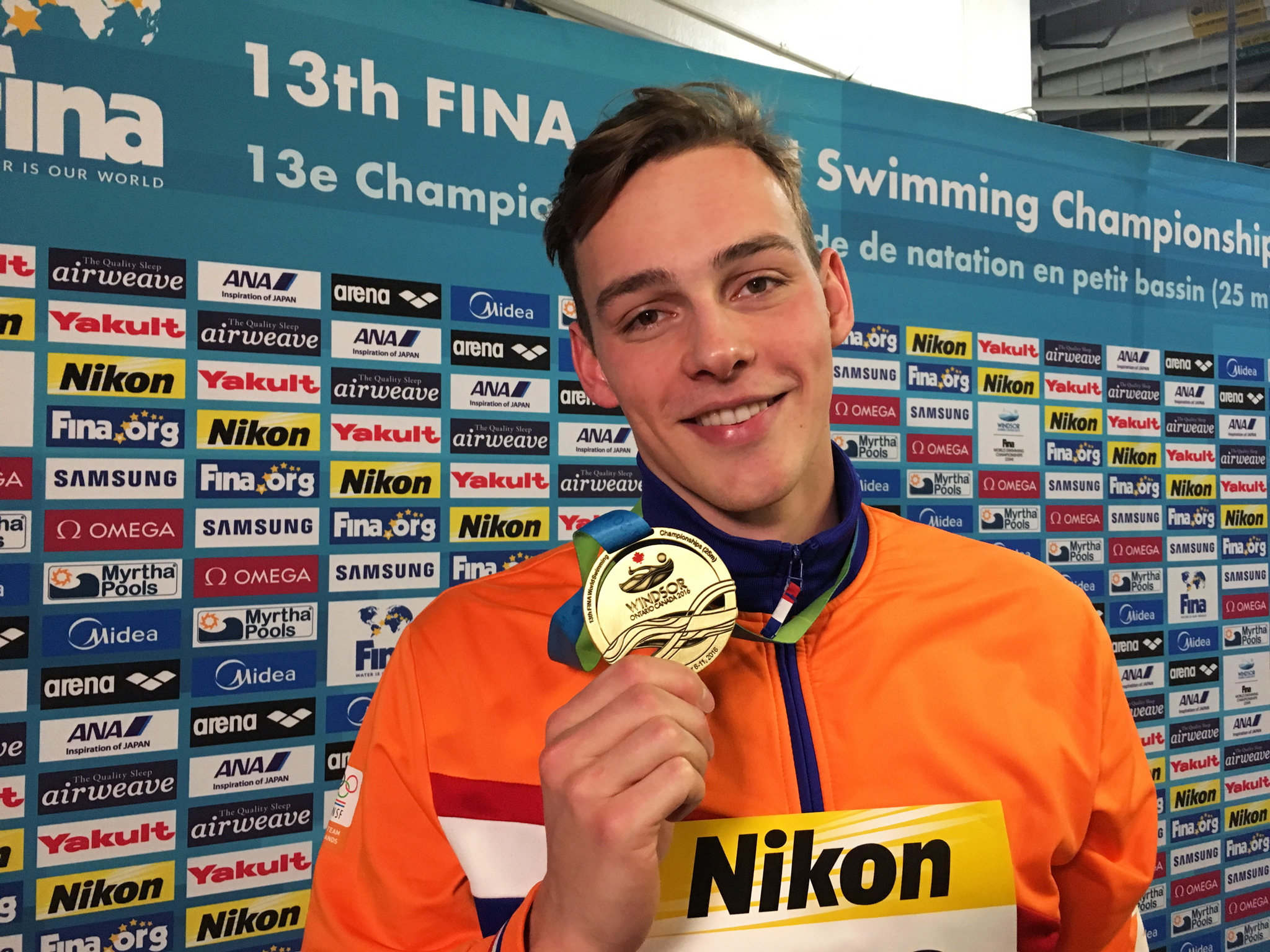 Jesse Puts wint gouden medaille op de 50m vrij WK korte baan.